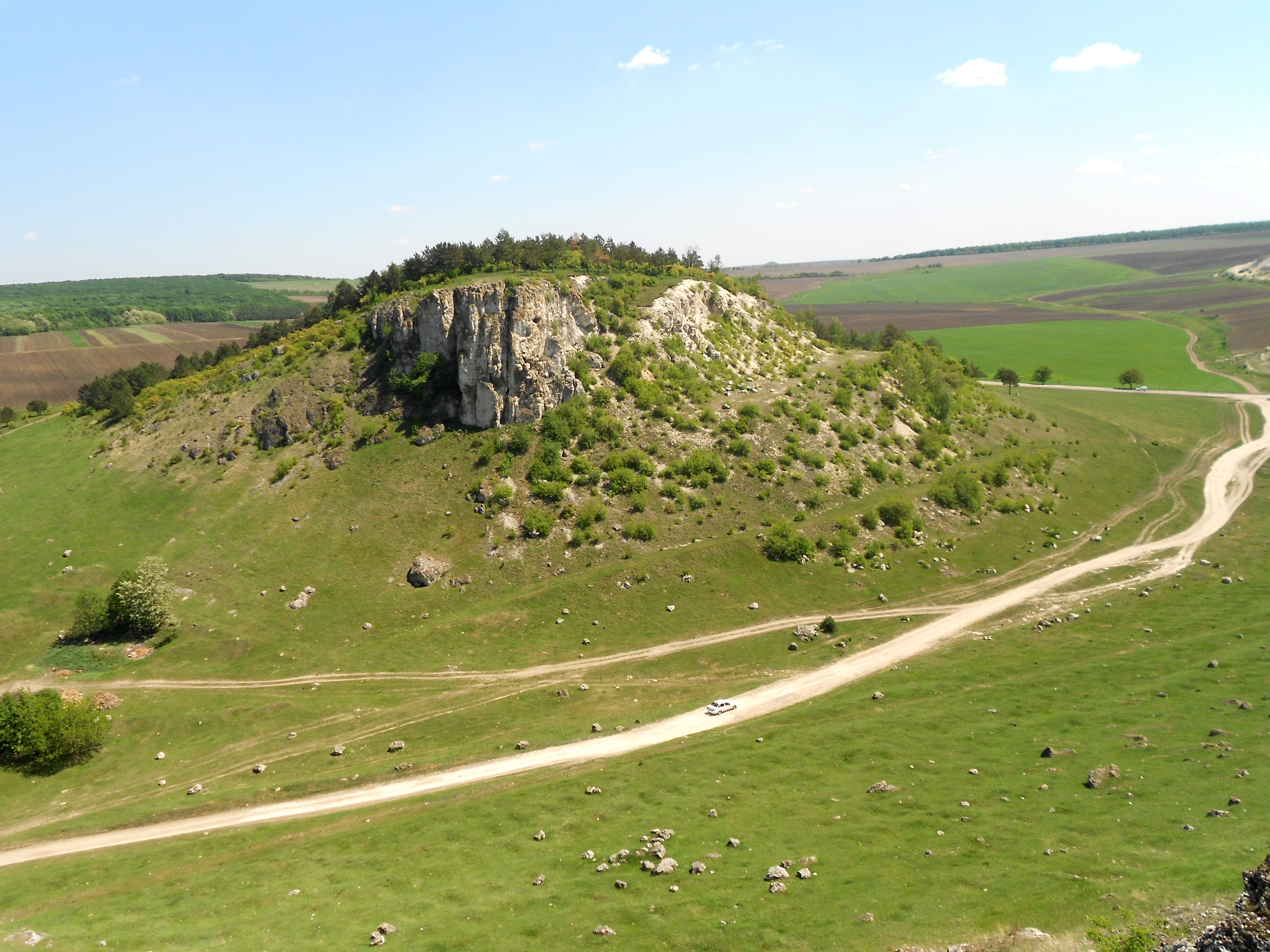 Stâncă calcaroasă în apropiere de satul Fetești, raionul Edineț, Republica Moldova